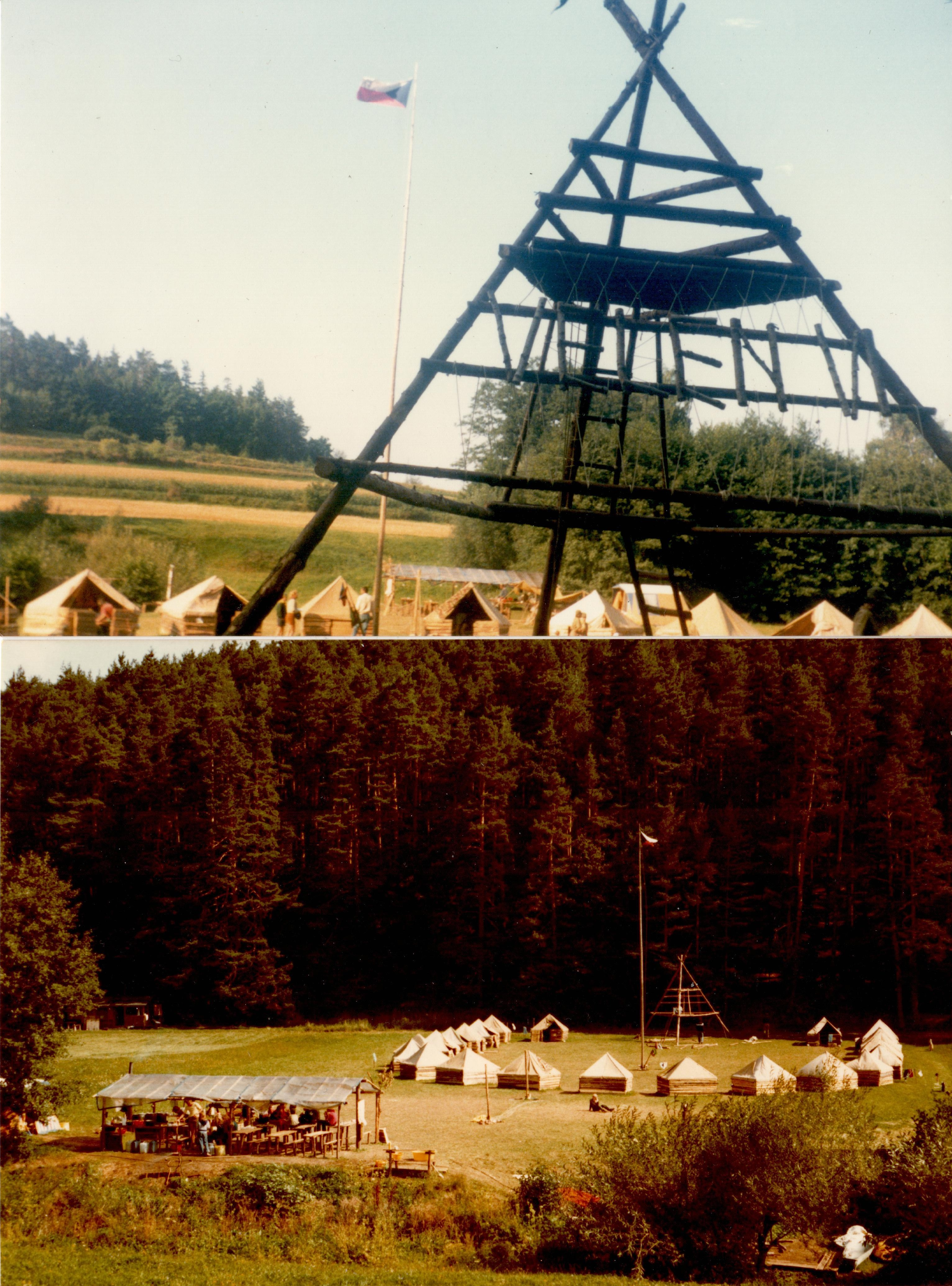 Letní skautský tábor Velen VI exilového oddílu br.Čapků, Dorna (Rakousko) 1981. Oddíl bratří Čapků sídlil v Bavorsku a byl součástí Českého a slovenského exilového skautingu. Jeho tábory nesly název "Velen" na počest světového starosty exilového skautingu, Velena Fanderlika. Tábořilo se v dřevěných podsadách pro dva o čtvercovém půdorysu (2,2m x 2,2m). Na podsadě, vysoké zhruba 0,8m byl posazen krov z latí a na něm napnuta jehlanová plachta, která vznikla sepnutím 4 trojúhelníkových stanových dílců.